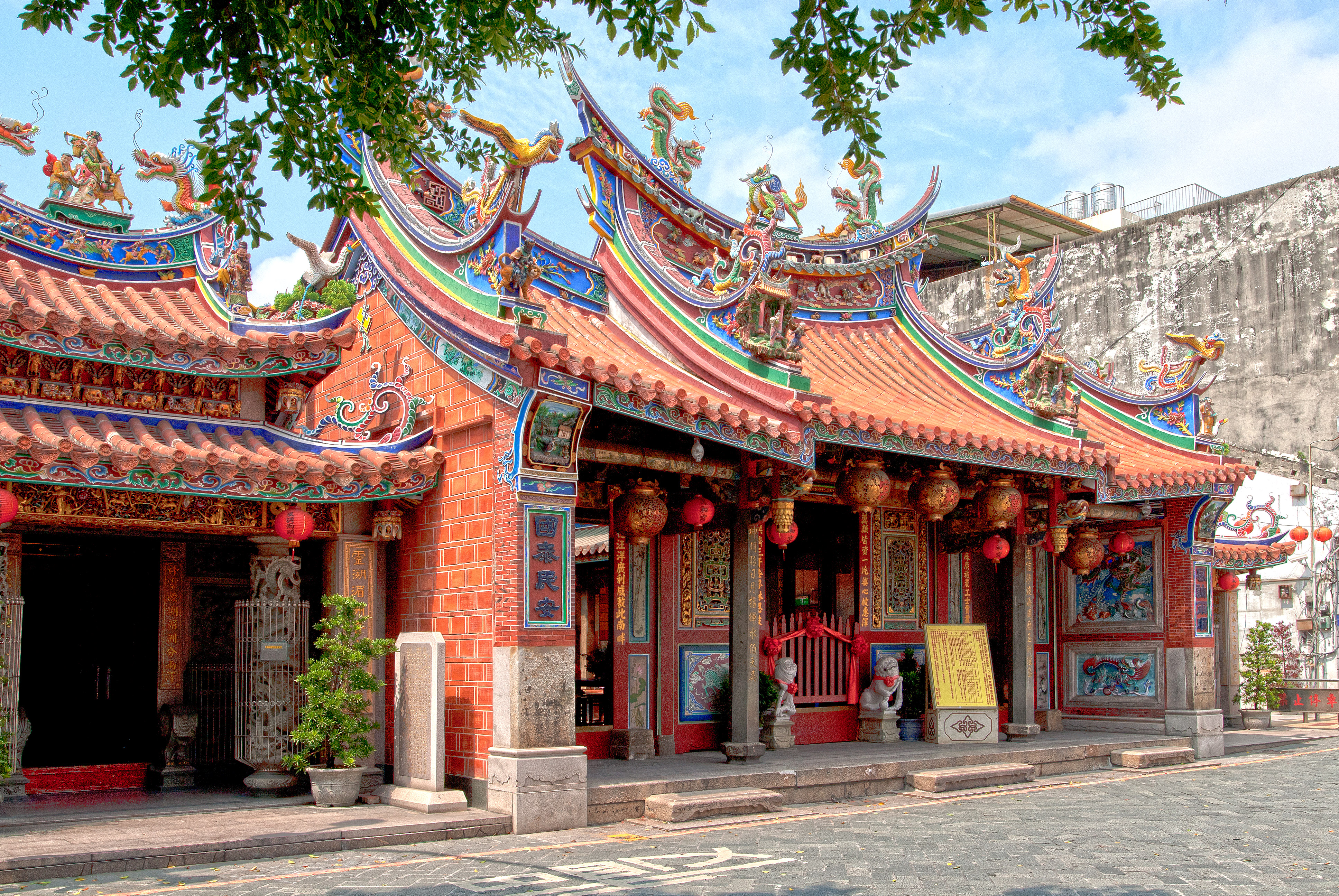 第三級古蹟